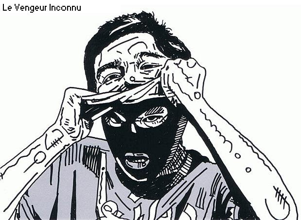 ceci est l'image laissé sur les profils Facebook de ces victimes